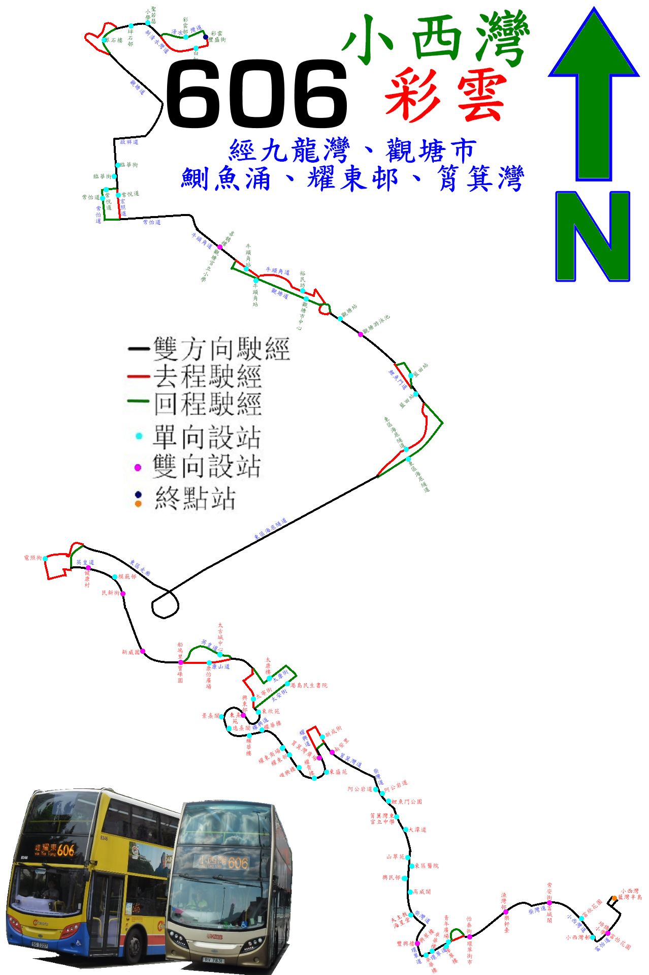 中文（香港）: 過海隧巴606線的走線圖